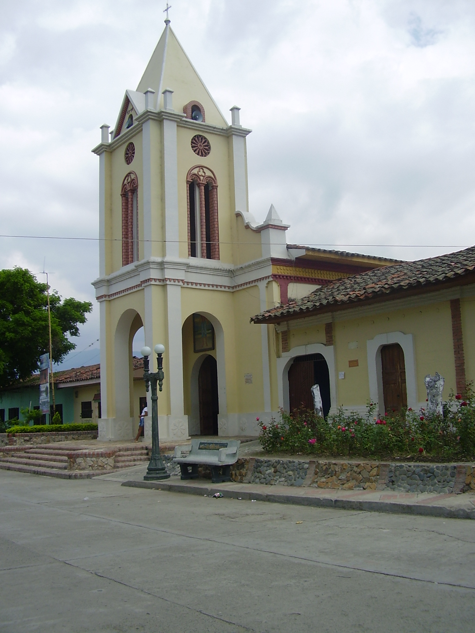 Fotografia de la Iglesia de Santa Elena, El cerrito Valle Colombia